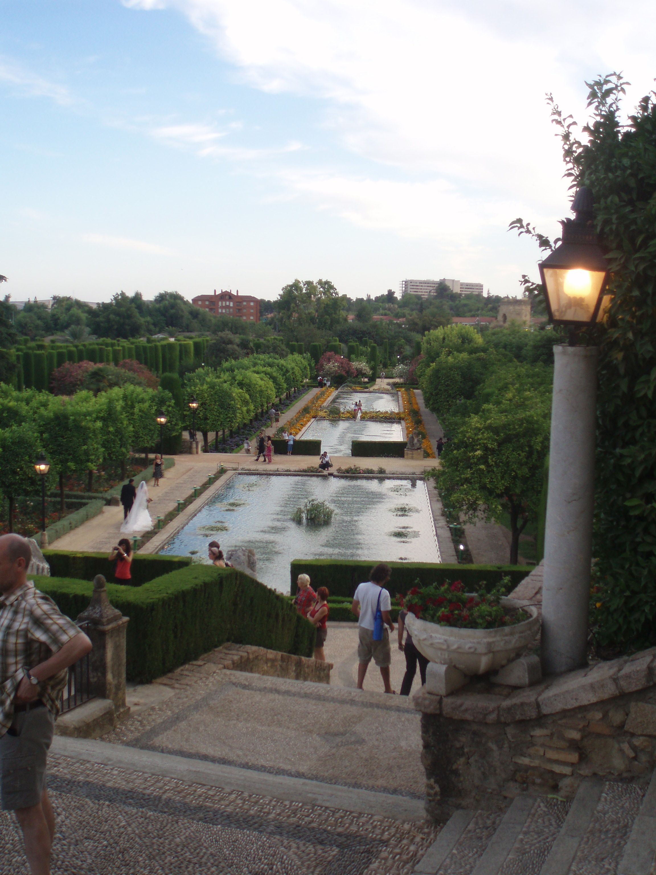 Jardines del Alcázar de los Reyes Cristianos, en Córdoba (España)